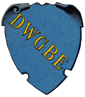 Титульна сторінка «Балтійського гербовника». Герб Езеля (XVI століття); DWGBE — Das Wort Gottes Bleibt Ewiglich (Слово Господнє лишається вічно)